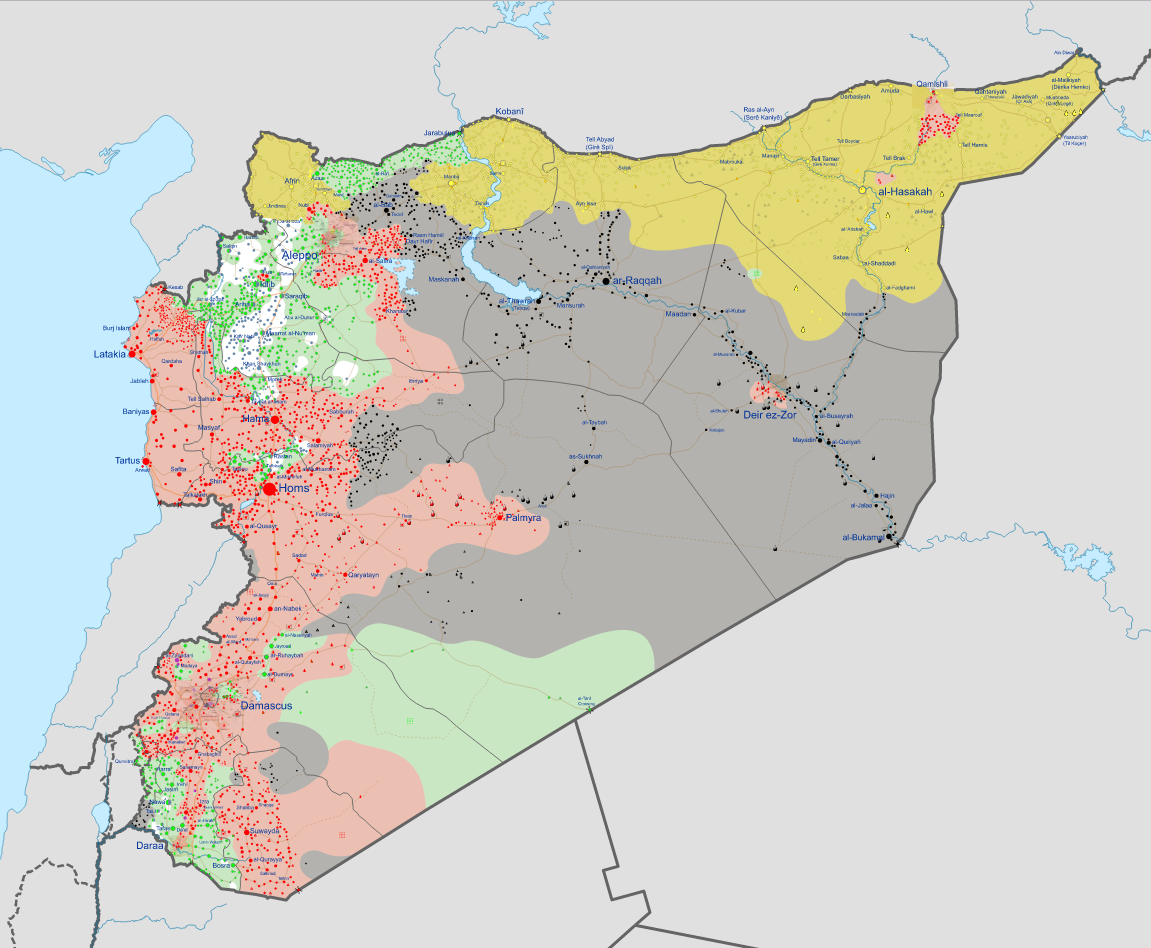 Guerre civile syrienne au 1er novembre 2016